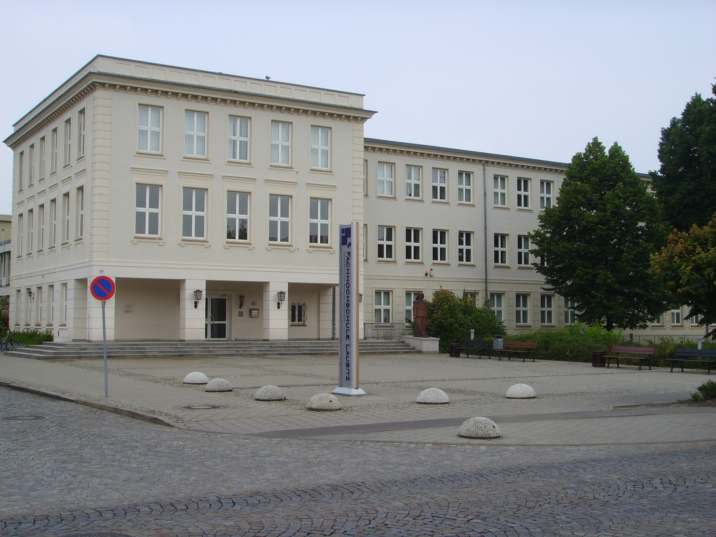 Hauptgebäude der Fachhochschule Lausitz in Senftenberg